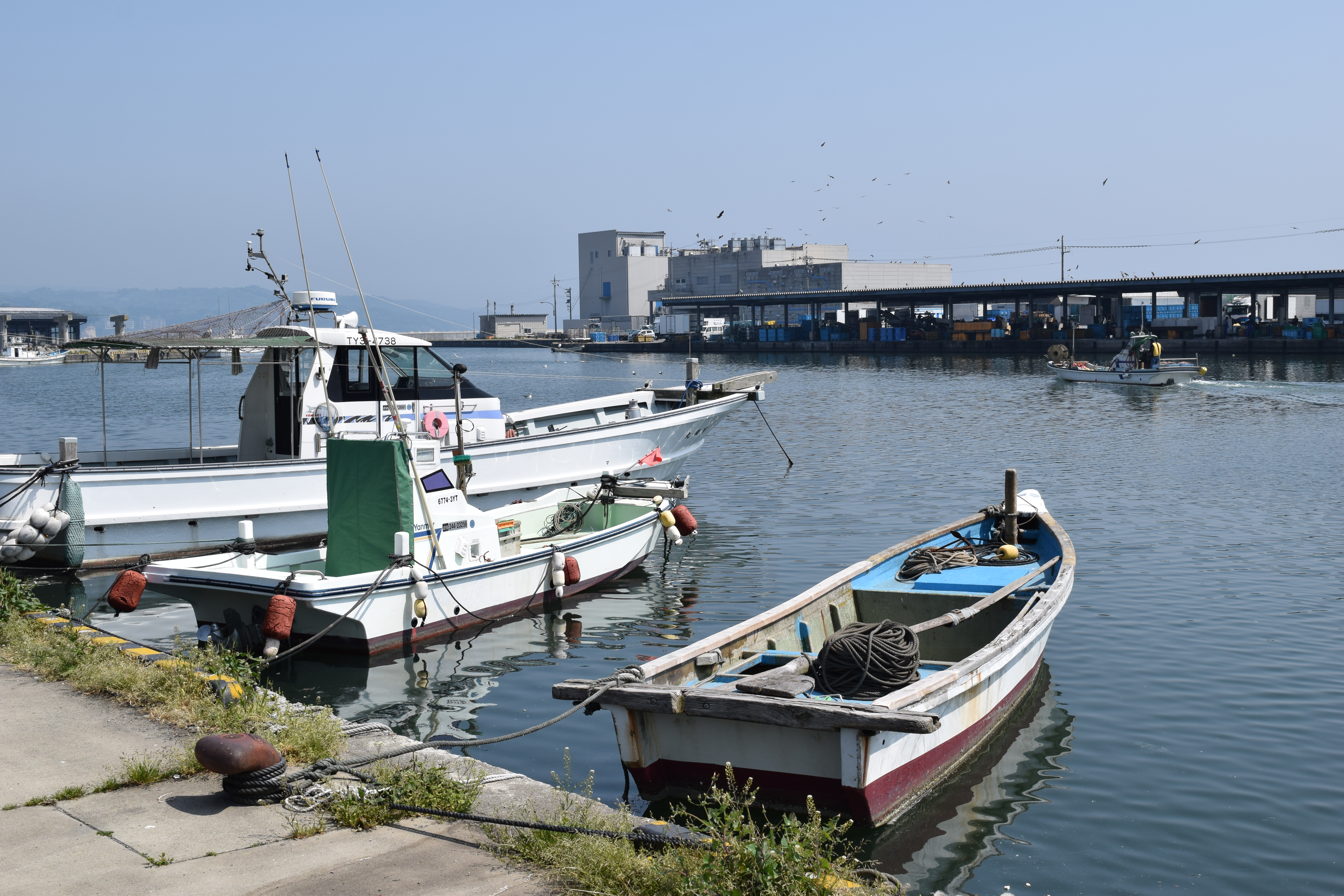 氷見漁港(氷見市）